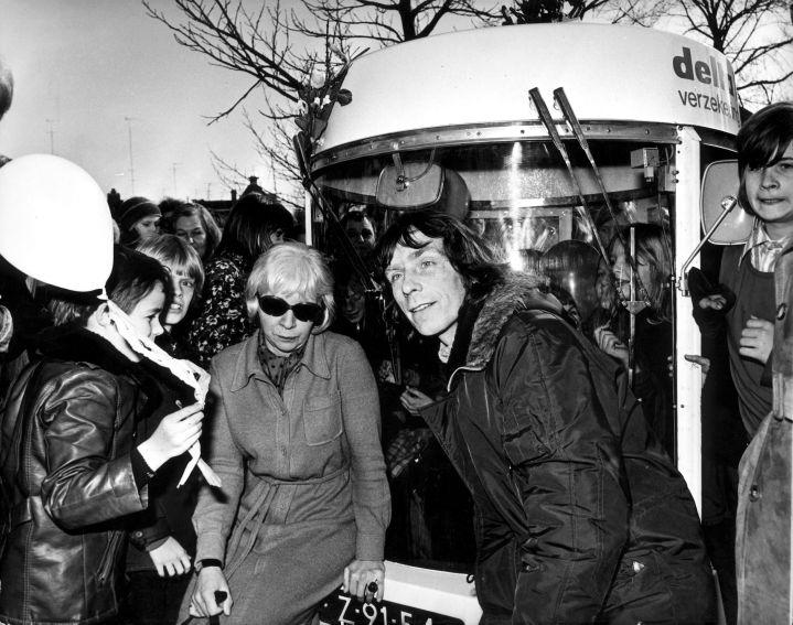 Verkeersminister Irene Vorrink en Luud Schimmelpennink (geestelijk vader van de Witkar) bij de opening van het eerste Witkarstation op het Amstelveld in Amsterdam, 21 maart1974.